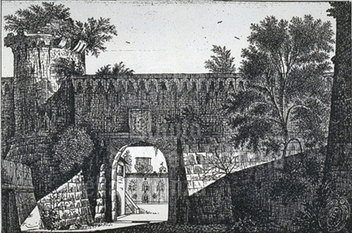 La Fortezza di Pisa, oggi conosciuta come giardino Scotto come appariva nella metà del '800.